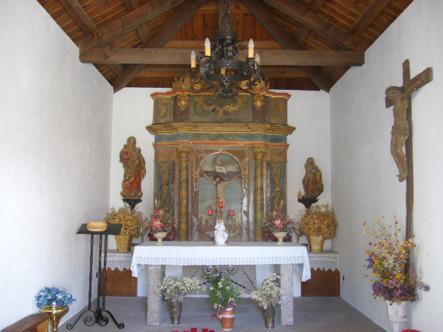 Retablo de la Ermita (Año 2008).